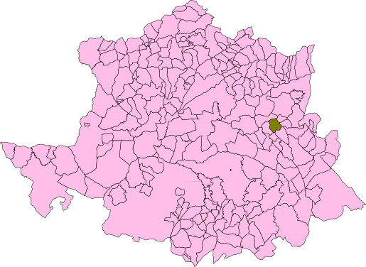 Belvís de Monroy